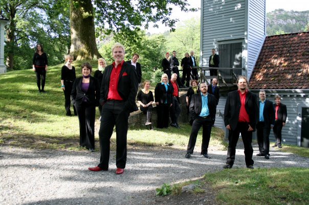 Vokalensemblet Skrik